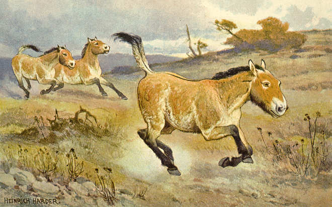 Przewalski-Pferd